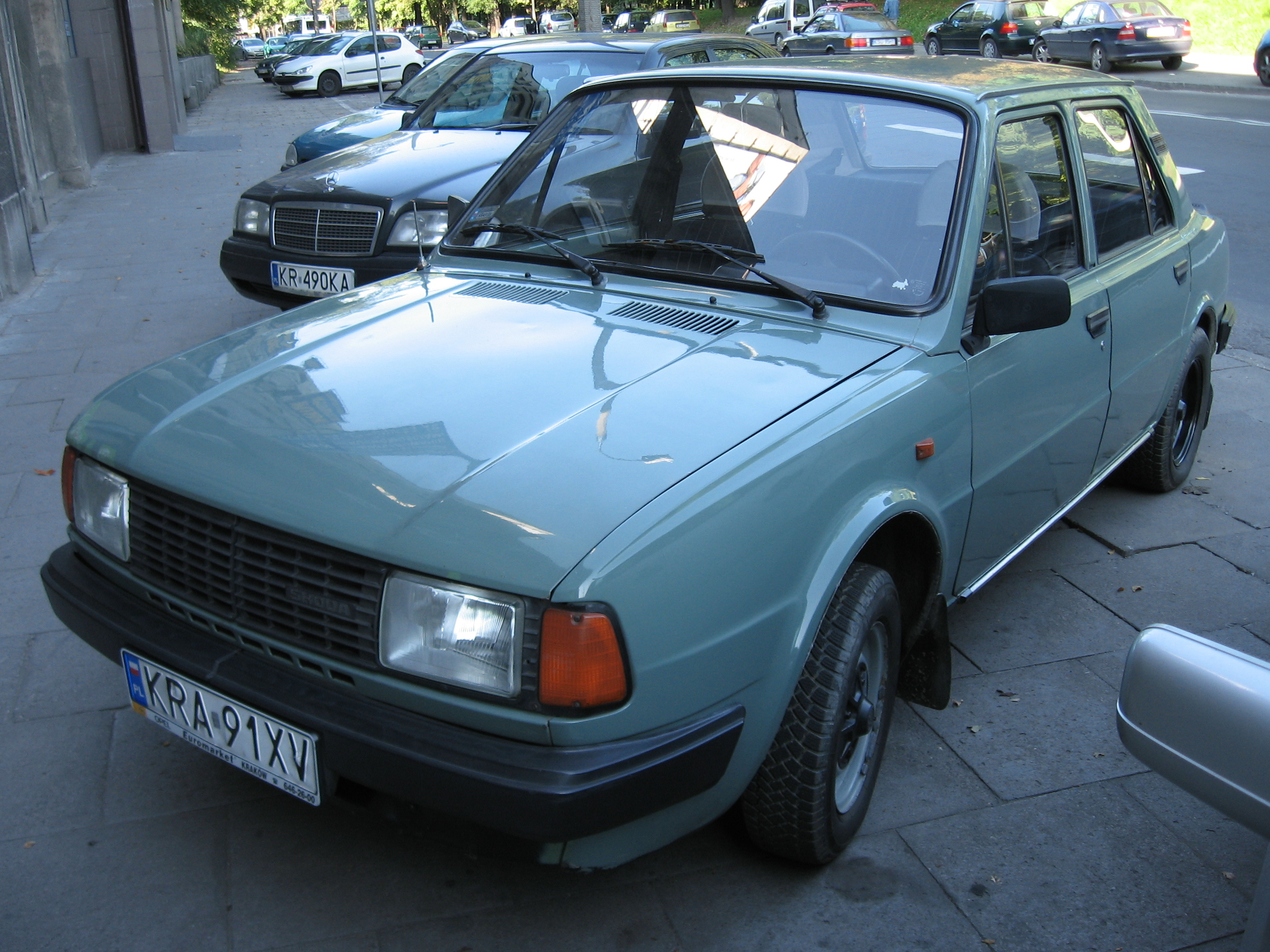 Škoda 120 L produced between 1986 and 1988 on Prądnicka street in Kraków.